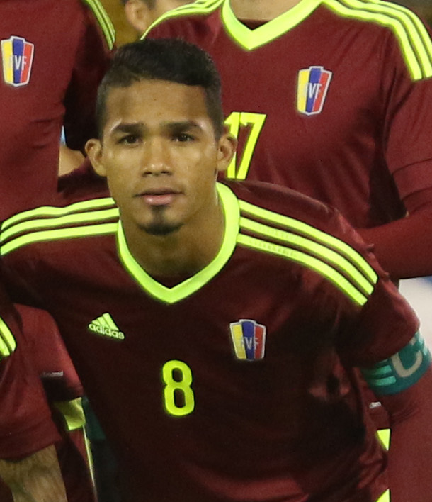 Quito, 2 feb (Andes).- La selección juvenil de Venezuela goleó 4-2 este jueves a su par de Ecuador, que comprometió seriamente sus opciones de clasificar al Campeonato Mundial Sub 20 Corea del Sur 2017, que se desarrollará en mayo próximo. ANDES/Micaela Ayala V.